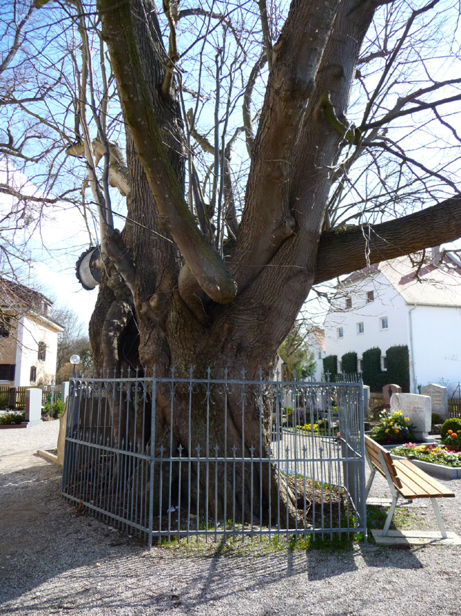 Edignalinde, Nordseite